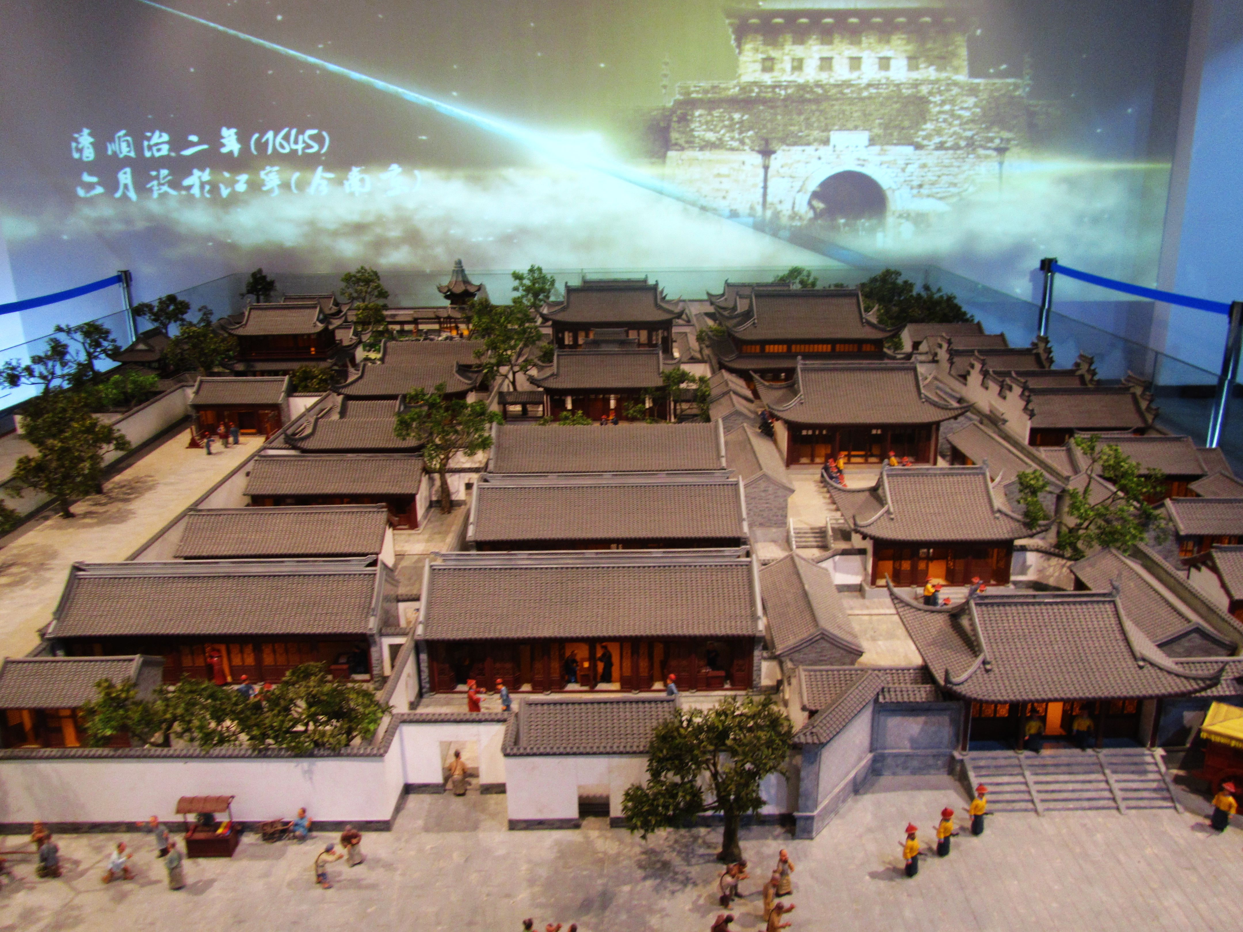 江宁织造府模型，现藏南京江宁织造府博物馆，此为其中路居住府邸。